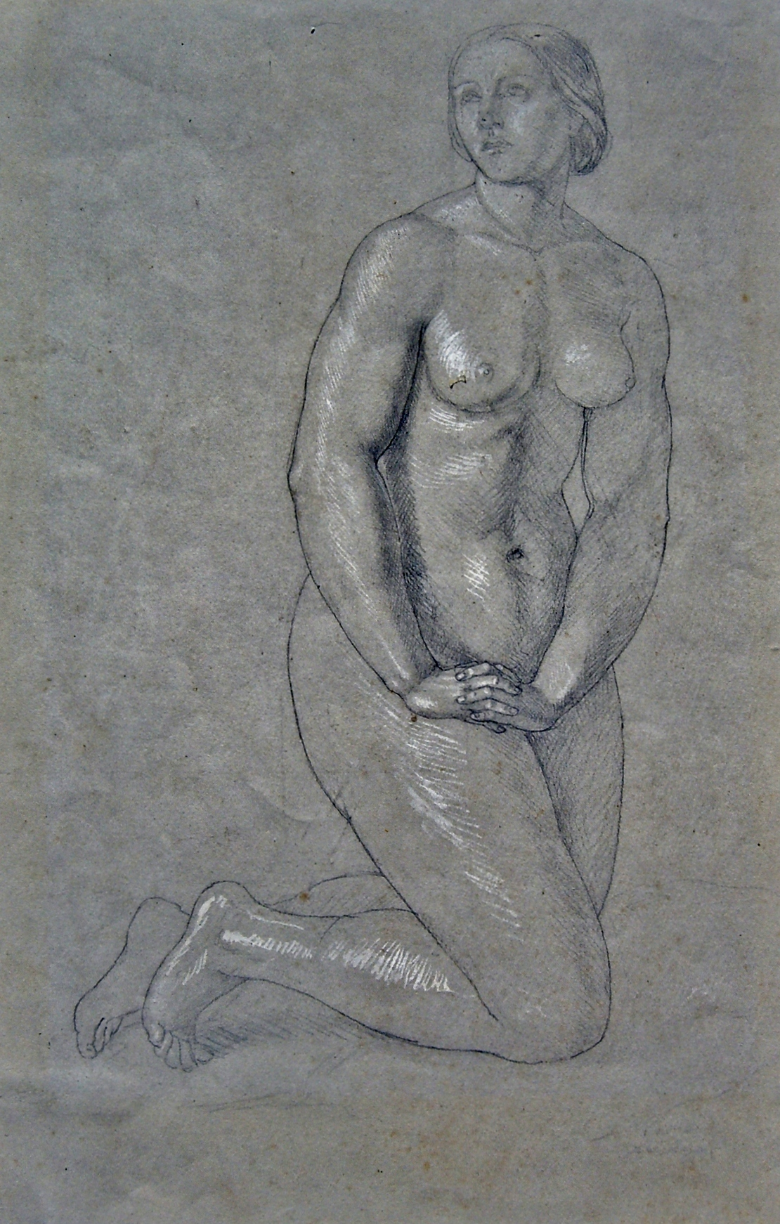 Aktzeichnung von Friedrich Lange